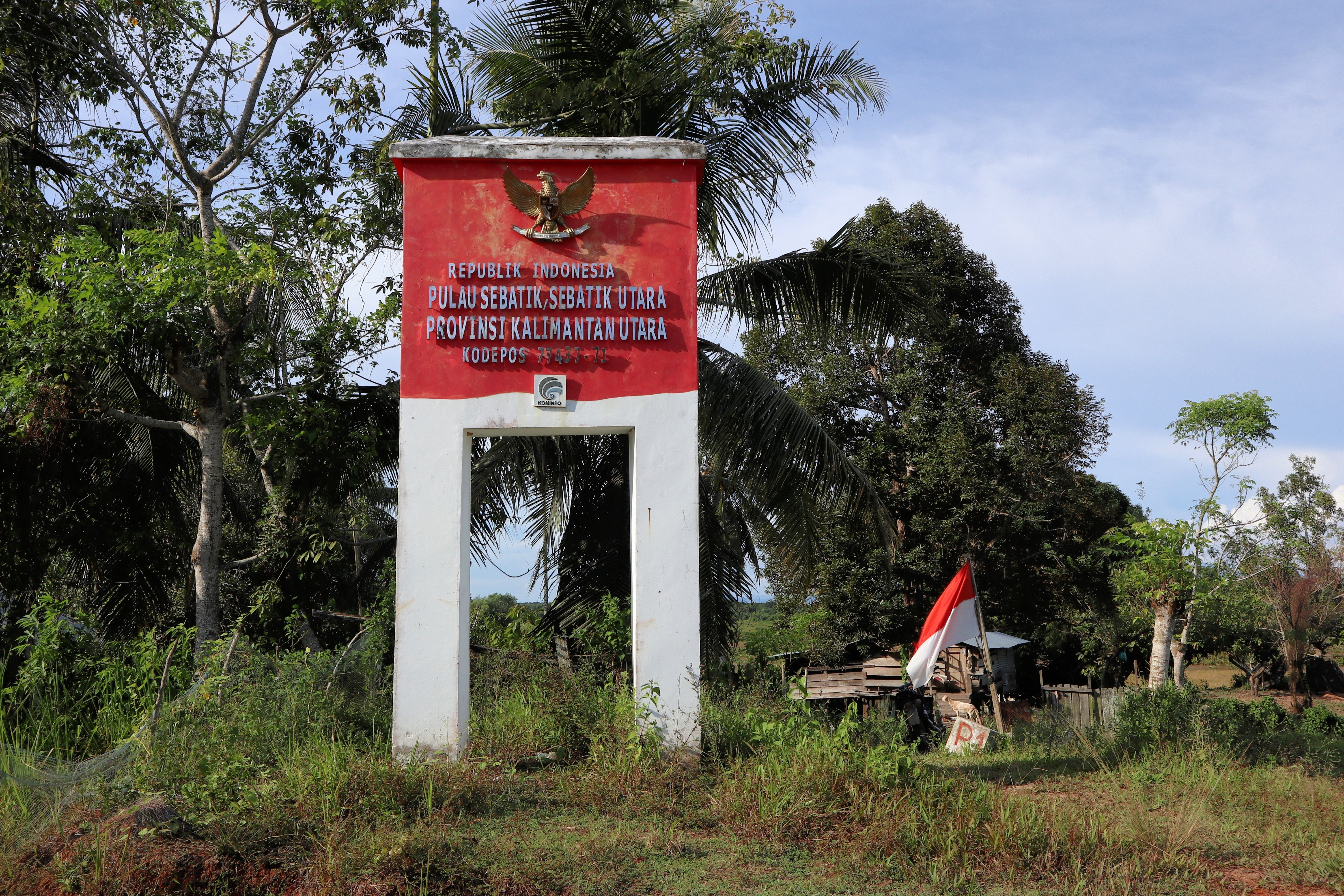 Patok 1 Perbatasan Indonesia-Malaysia di Sebatik Utara.